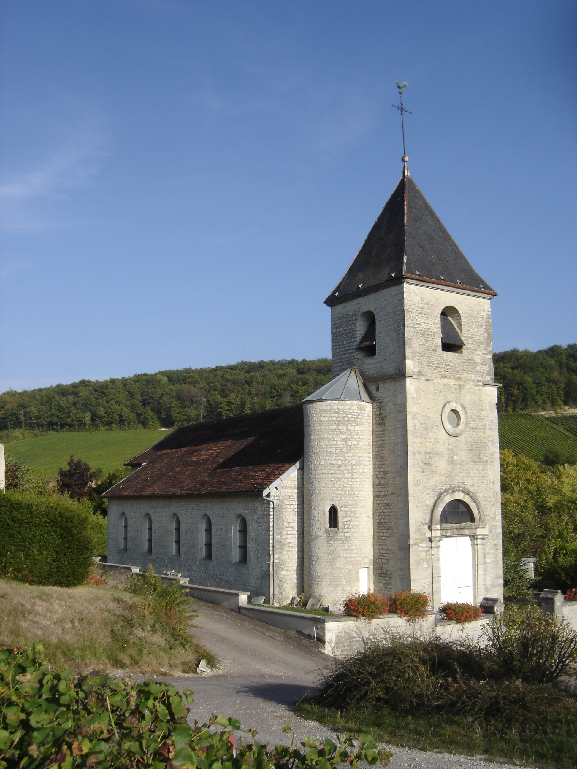 Église Saint Martin de Bergères (Aube, France)